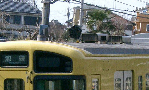 押し込み型に見えるが吸い出し型の特殊タイプ（西武9000系）.